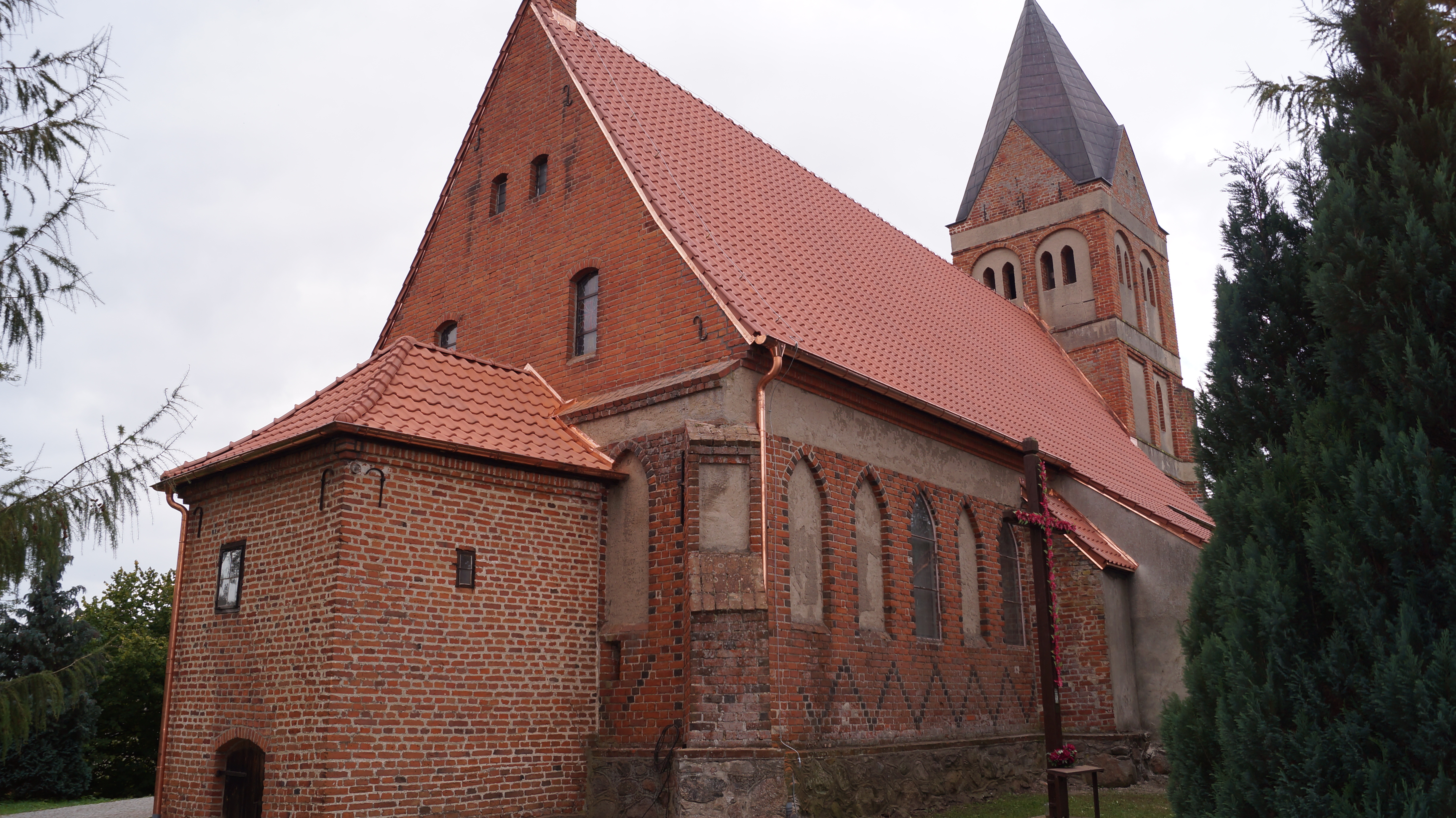 Myślice, kościół par. p.w. Wniebowzięcia NMP, pocz. XIV, 1872